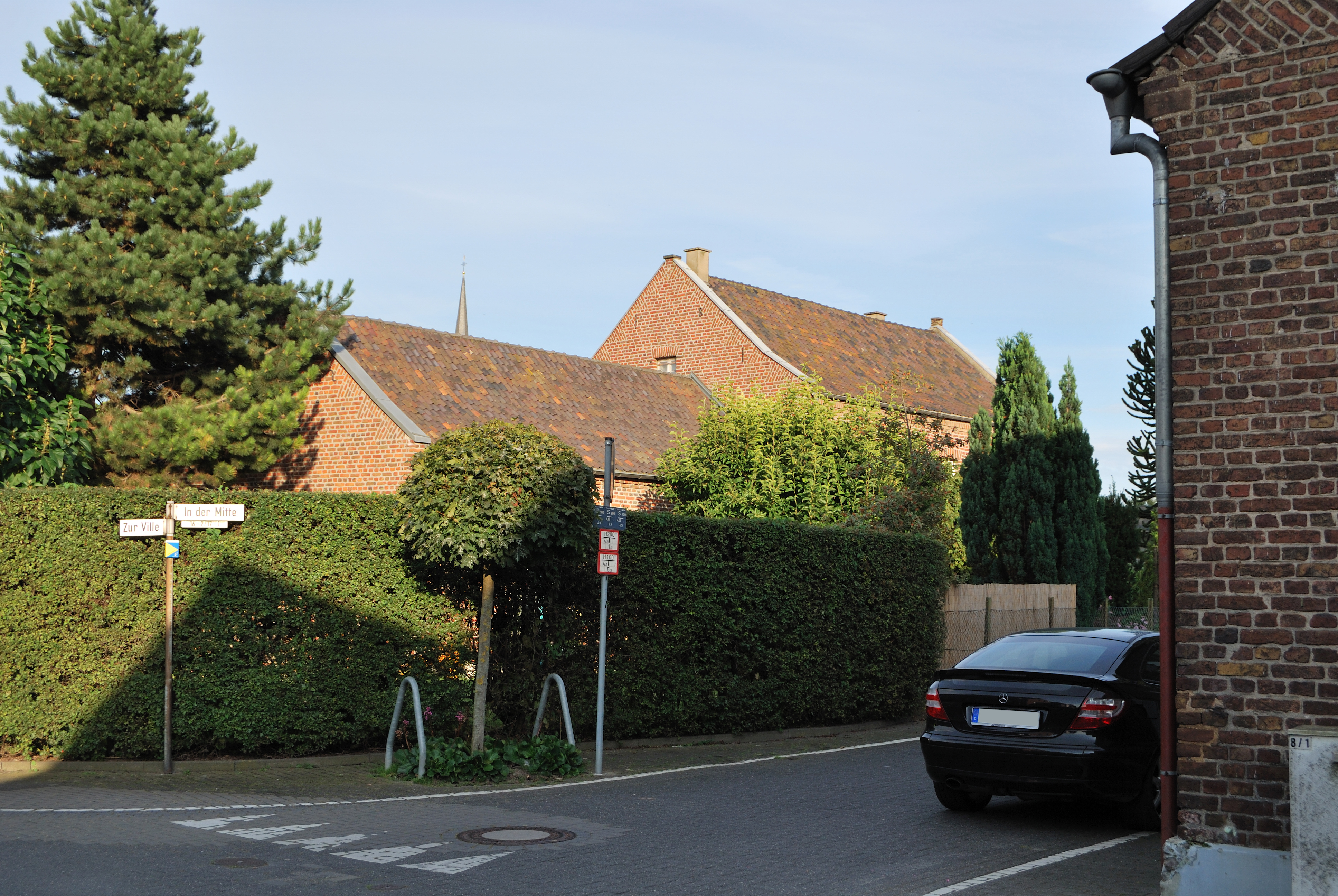 In der Mitte 16; Denkmalnummer 109